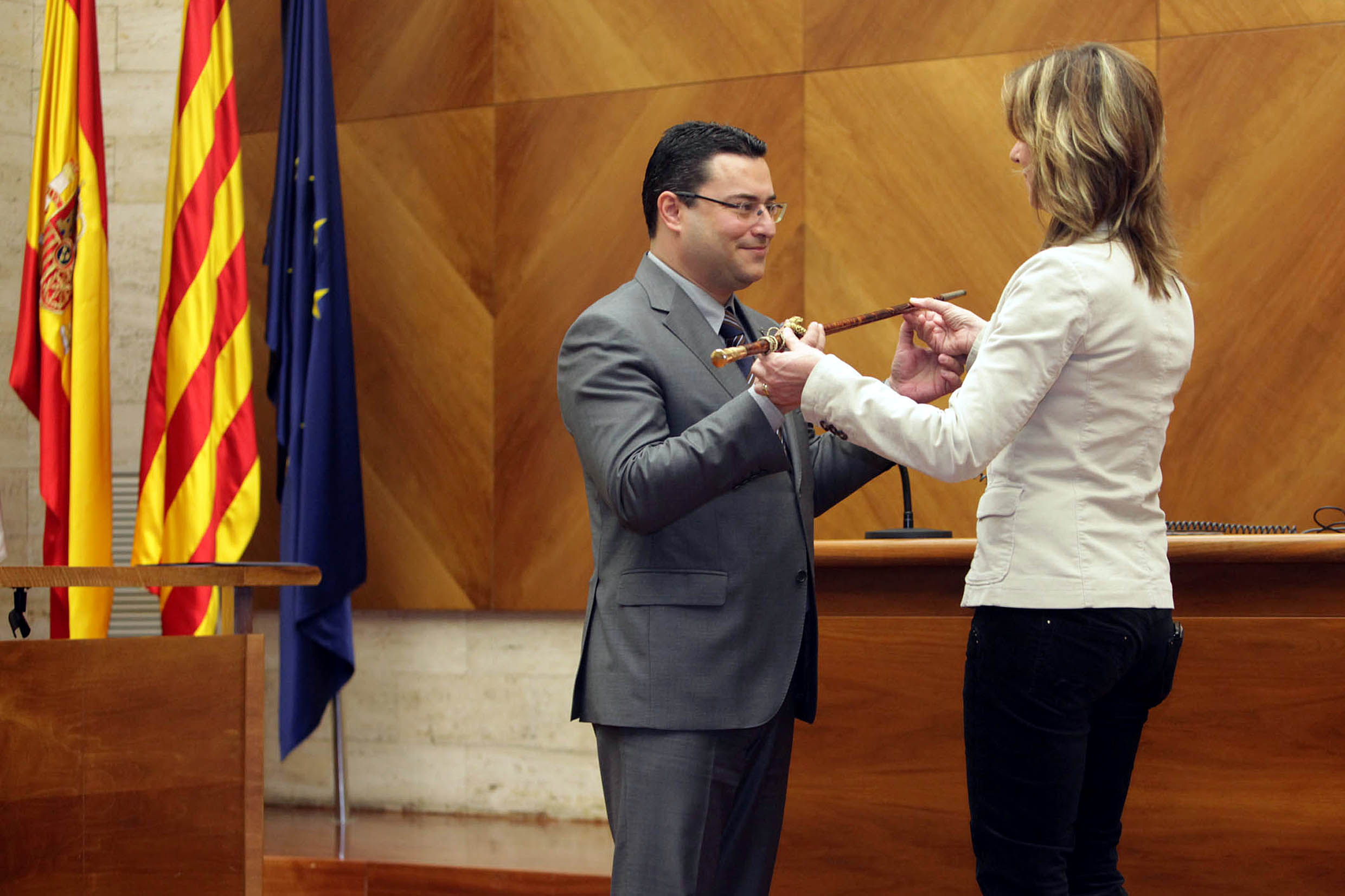 Joan Carles Sánchez prenent la vara d'alcalde